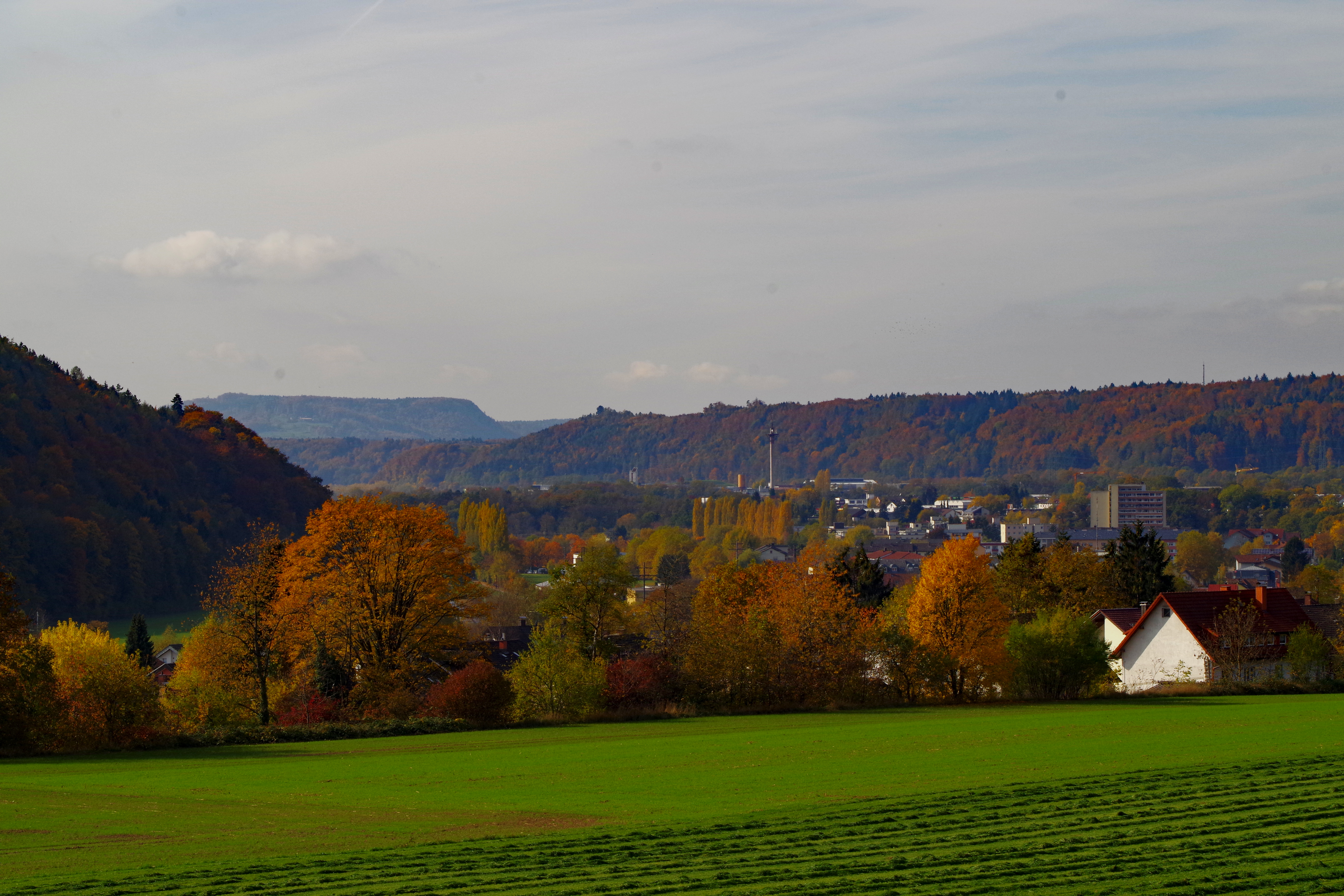 Waldshut-Tiengen, Blick von Tiengen entlang der Wutach zum Tafeljura: Hohwacht (im Hintergrund) bei Leuggern, rechts der Bürgerwald.